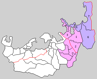 福井県三方郡の町村制時点の町村。